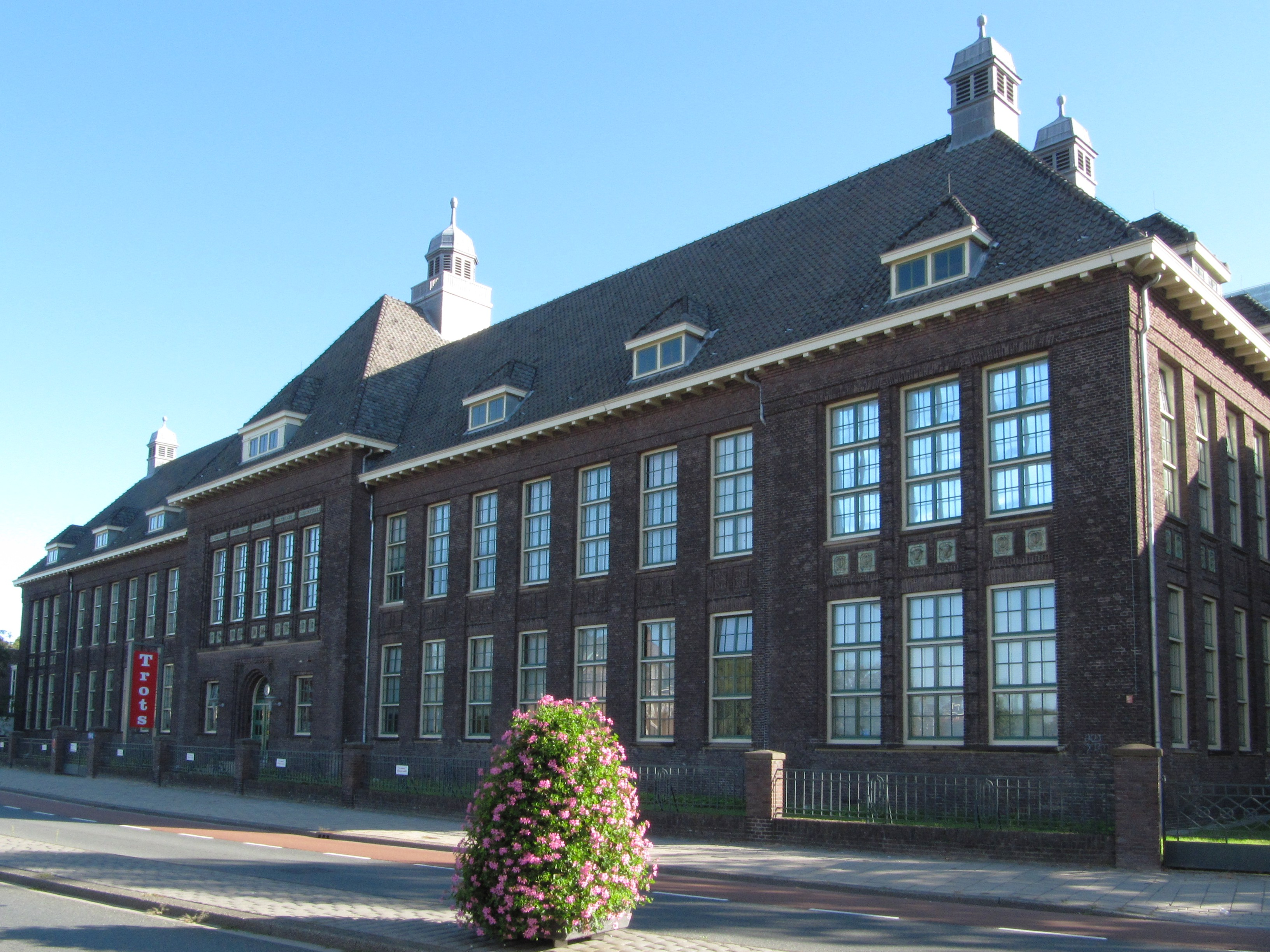 RM510617_-_Enschede_-_Ariensplein_3